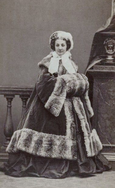 Мария Евгения Алиса де Брессан (1838—1909), с 1867 года жена князя М. В. Кочубей